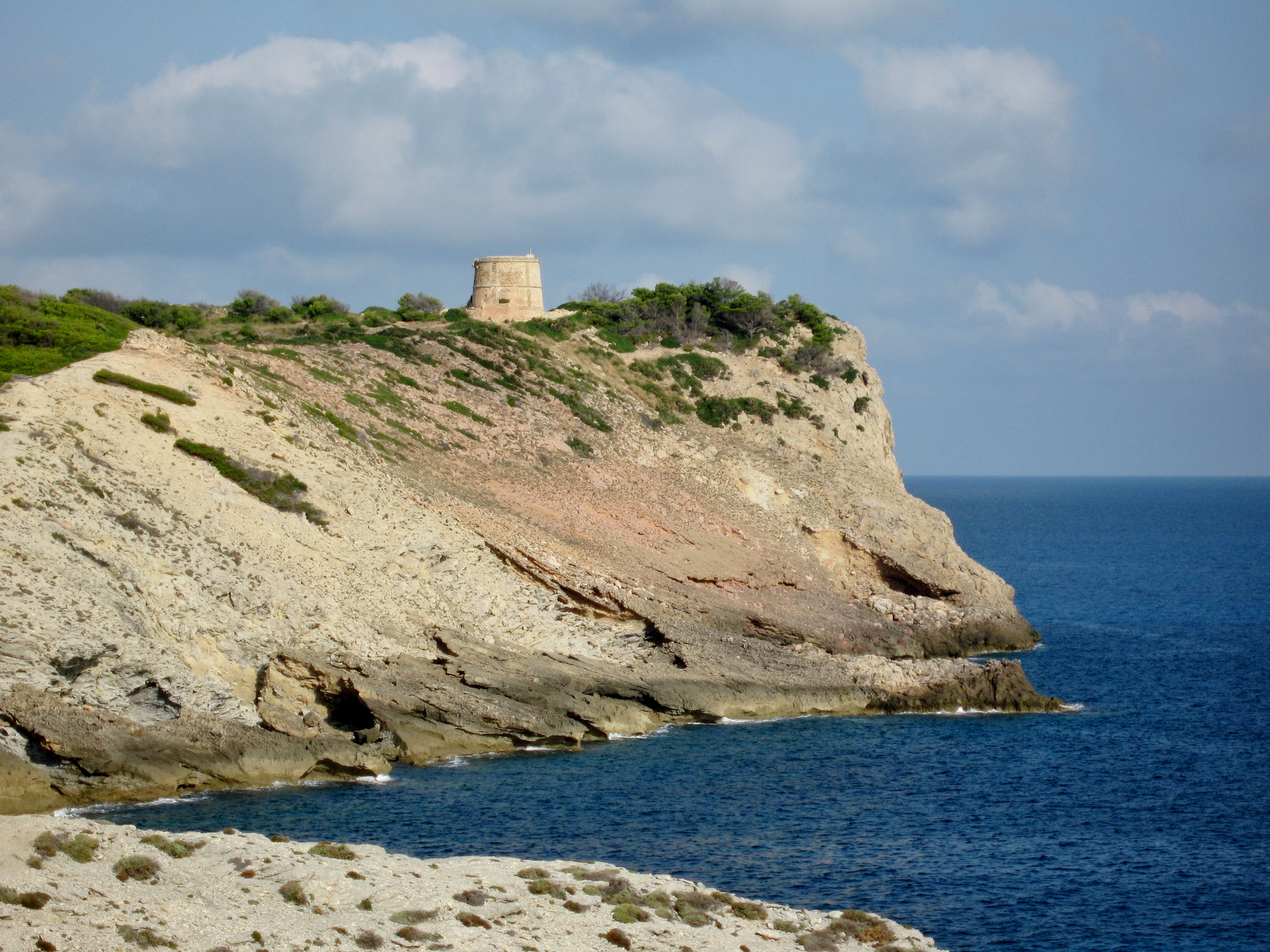 Torre des Matzoc (Torre d'Aubarca), Artà, Mallorca, Spain